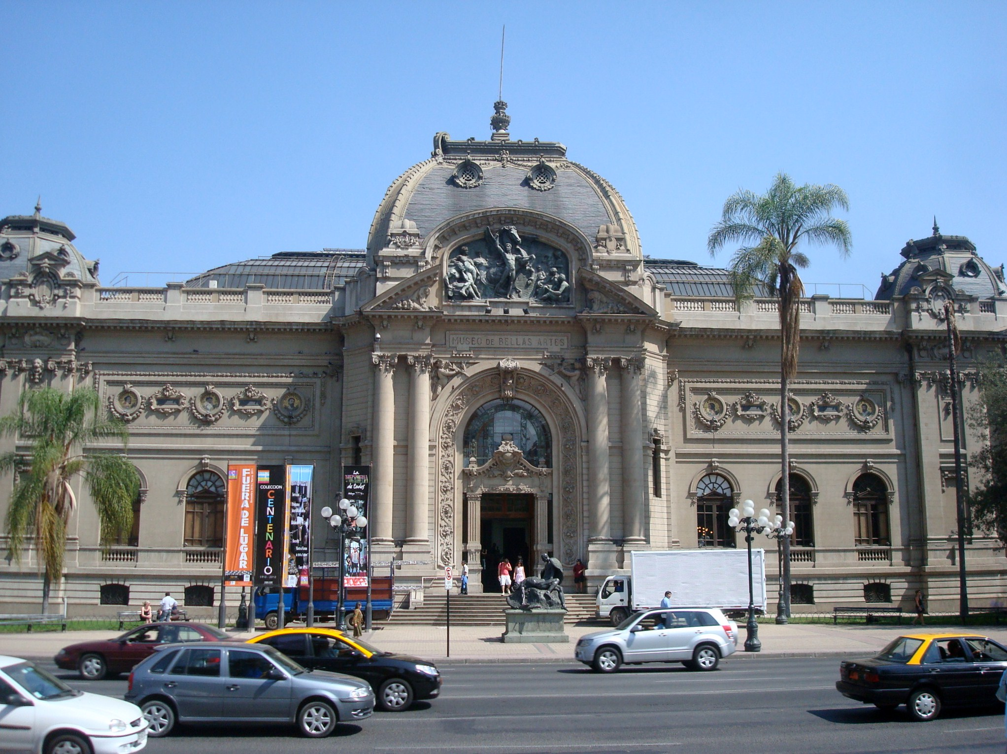 Museo Nacional de Bellas Artes, Santiago Centro, Chile